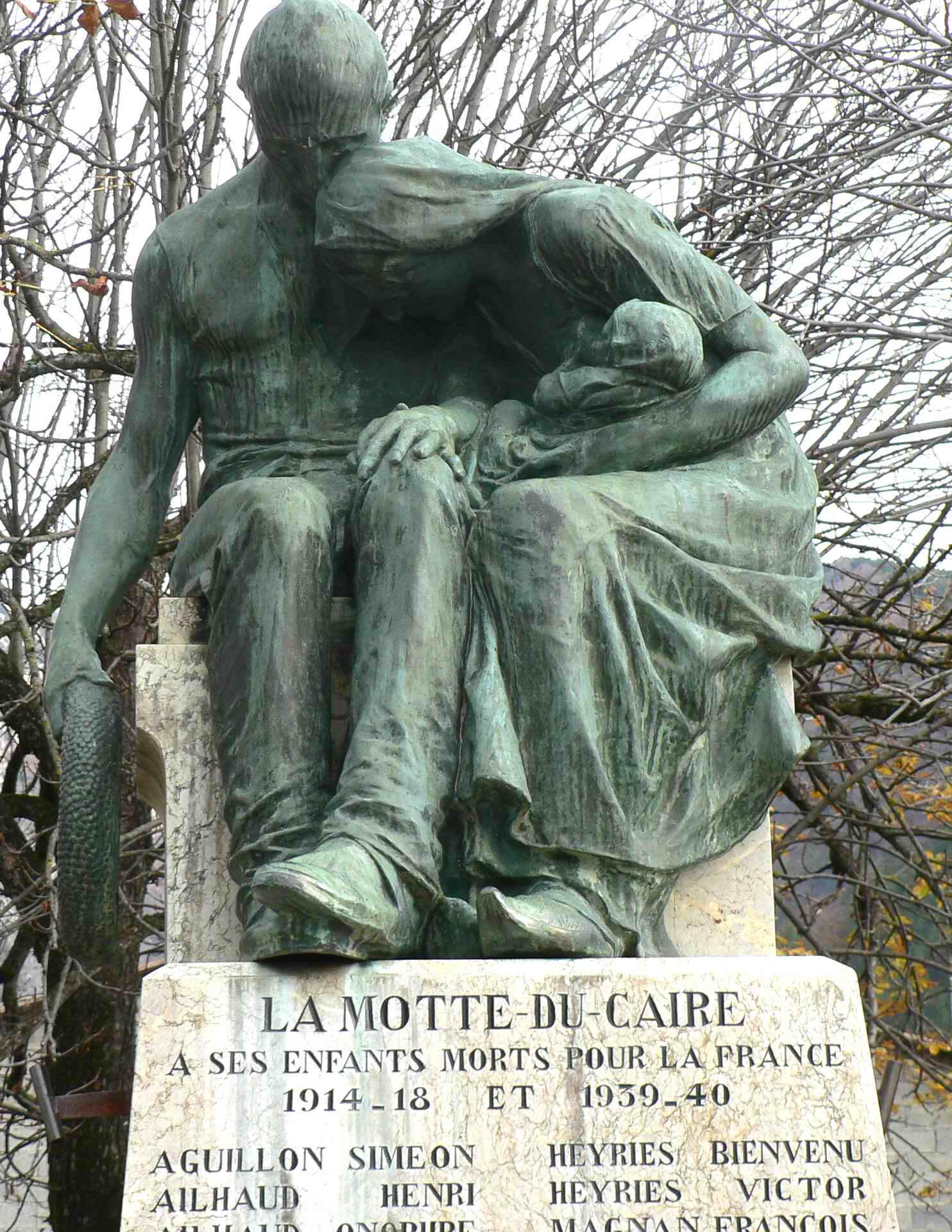 monument aux morts du village de la Motte du Caire